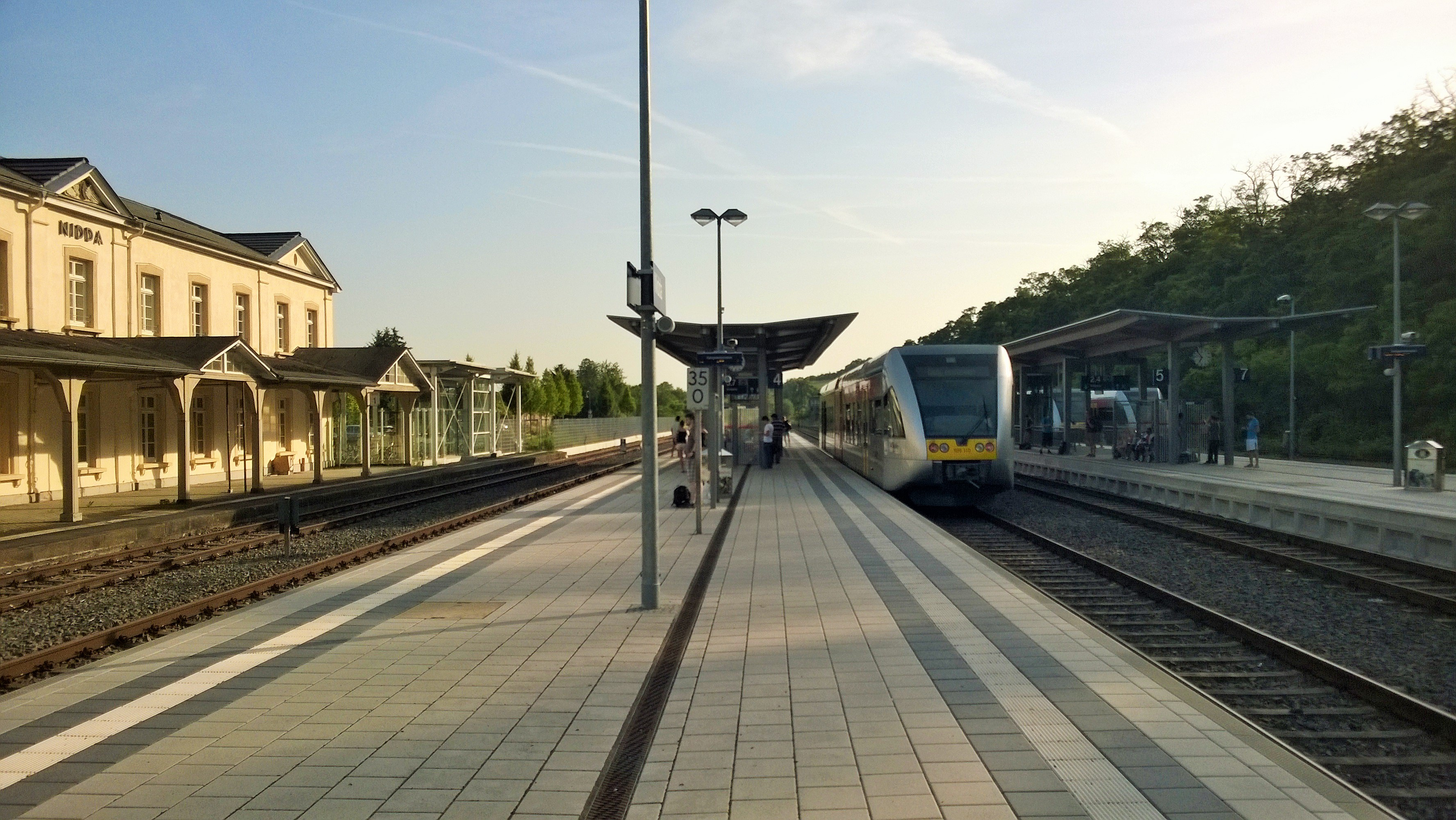 Die insgesamt fünf Bahnsteige verteilen sich von links nach rechts auf den nicht mehr planmäßig angefahren Hausbahnsteig sowie die Bahnsteige der Lahn-Kinzig-Bahn und Beienheim-Schottener Bahn.